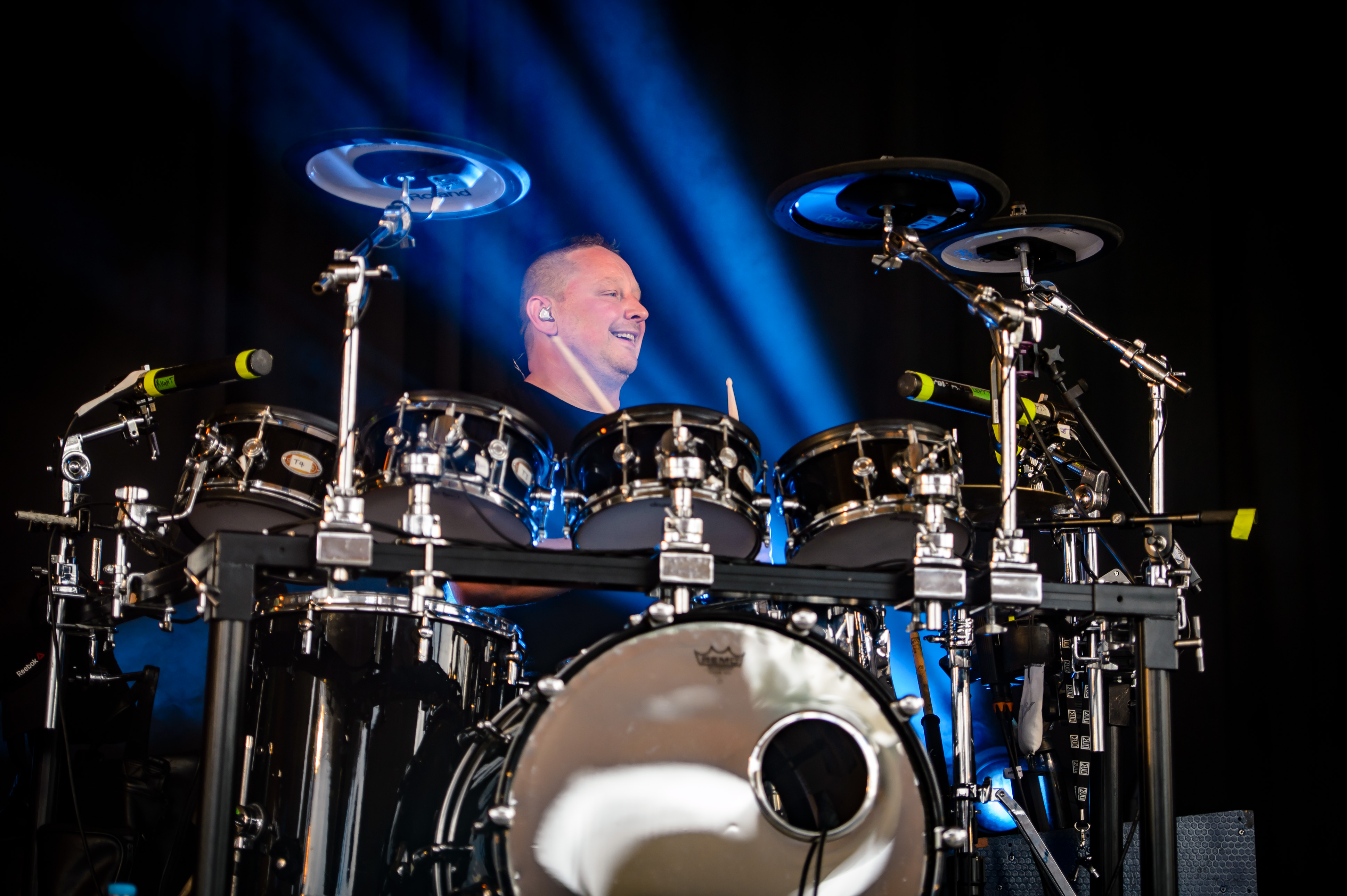 'Amphi Festival 2018; Tanzbrunnen Köln': 'OMD'